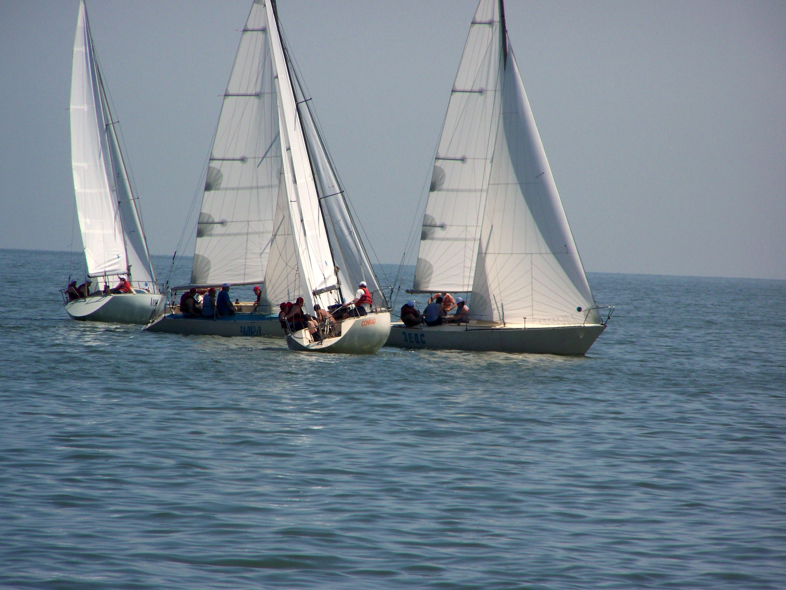 Prymors'kyi Blvd, 24, Mariupol', Donetsk Oblast, Ukraine